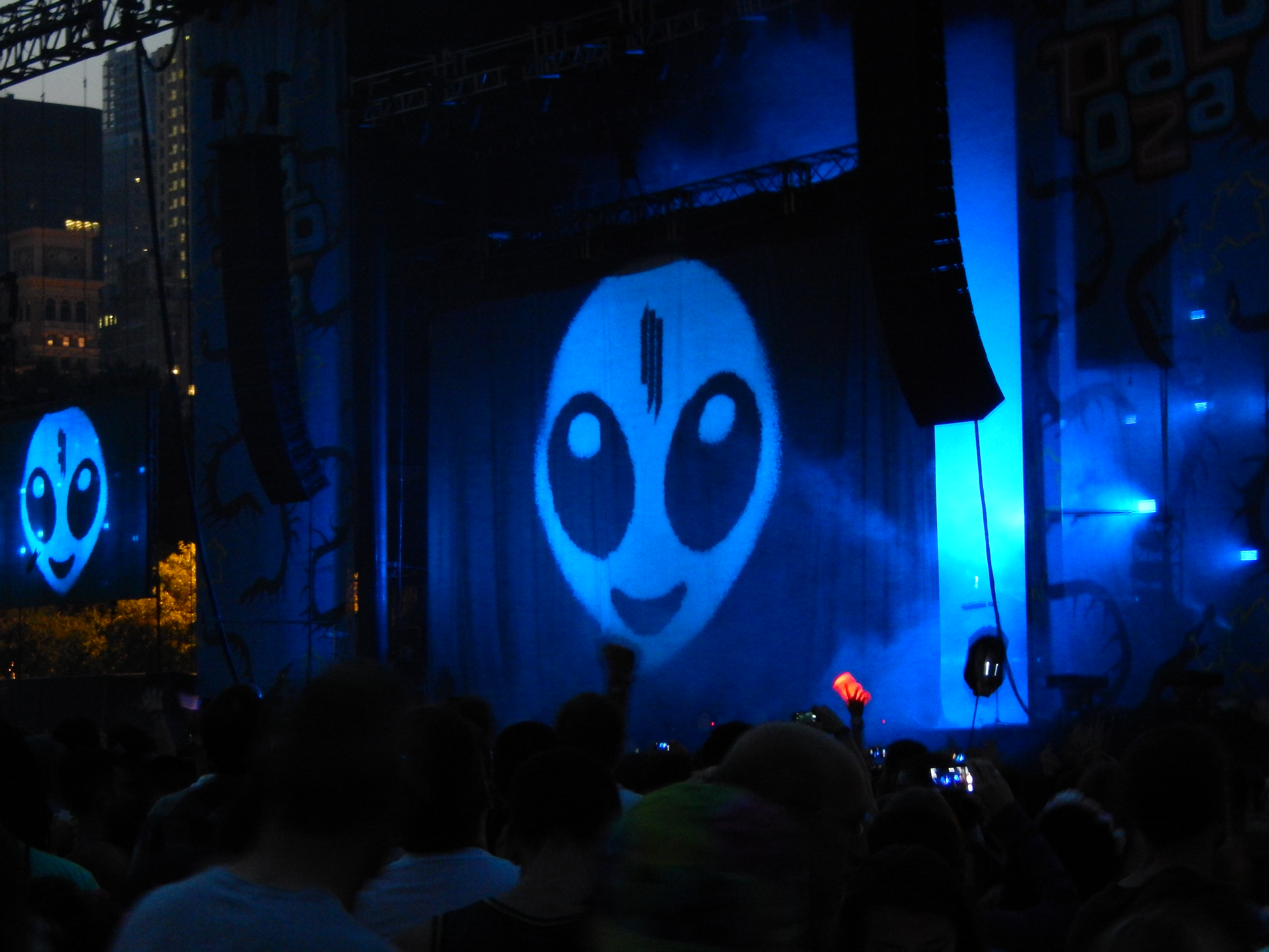 Skrillex